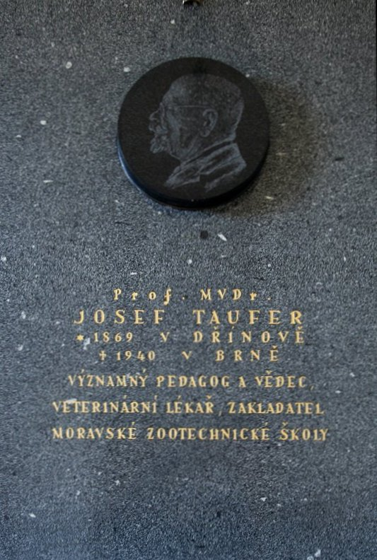 Pamětní deska MVDr. Josefu Tauferovi v budově TSOŠ veterinární - Kroměříž, Koperníkova 1429